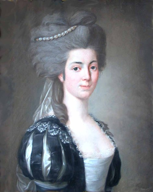 Leonor de Almeida Portugal, Marquesa de Alorna en Viena en 1780.